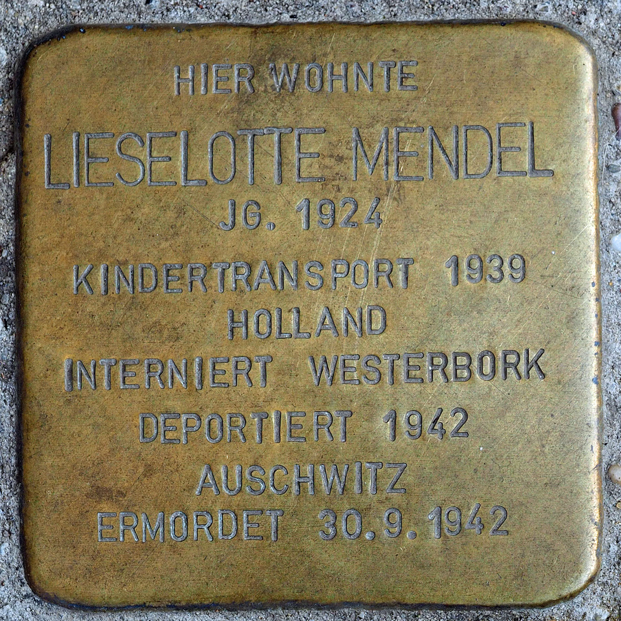 Stolpersteine in Kempen: Liselotte Mendel, Von-Loe-Straße 14